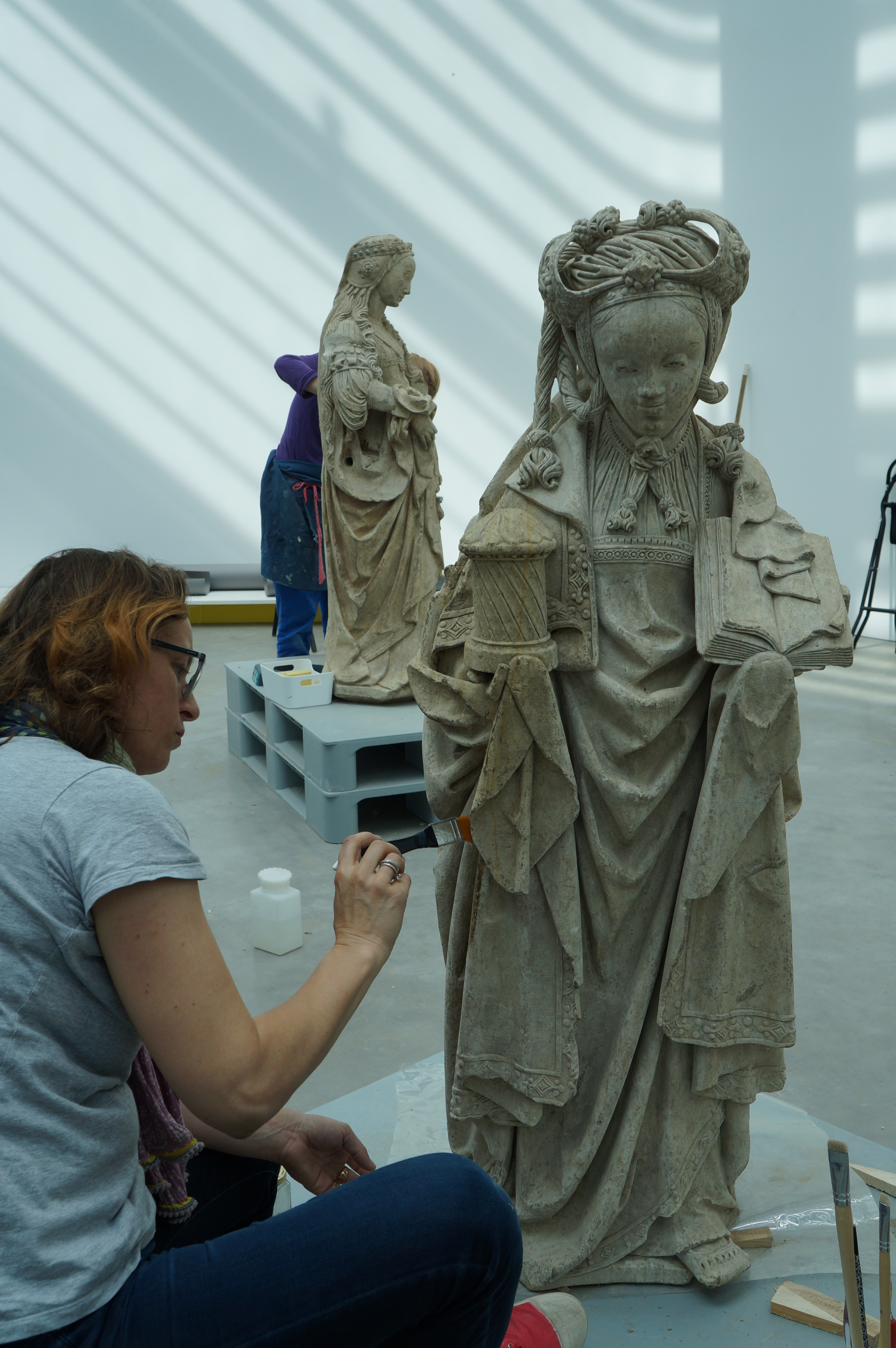 Restauration de Marie-Madeleine par Julie André-Madjlessi au Palais des Beaux-Arts de Lille en juillet 2016.